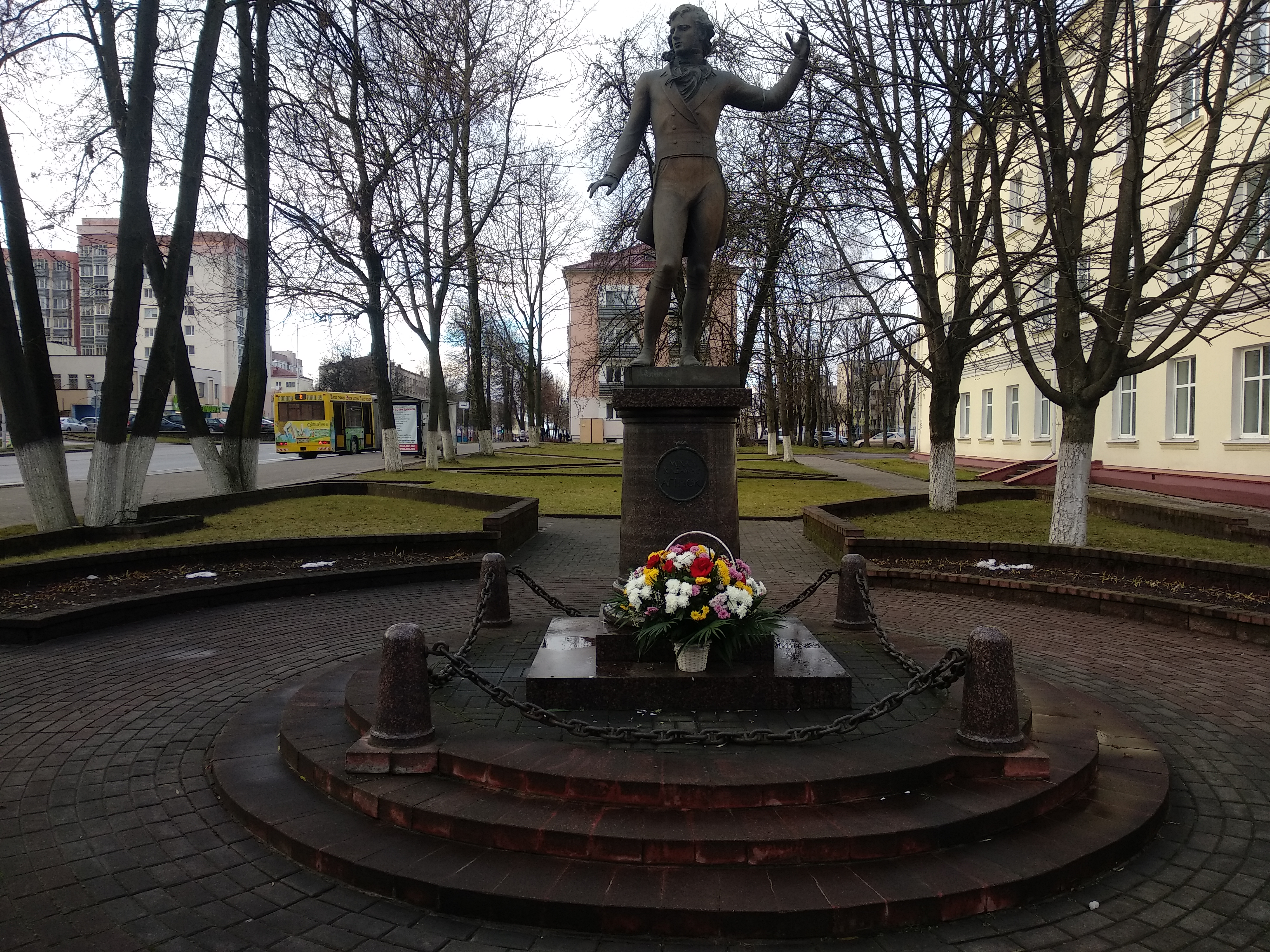 Maladzechna, Belarus